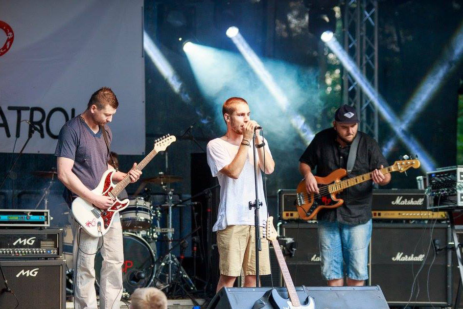 Coast Patrol at Live